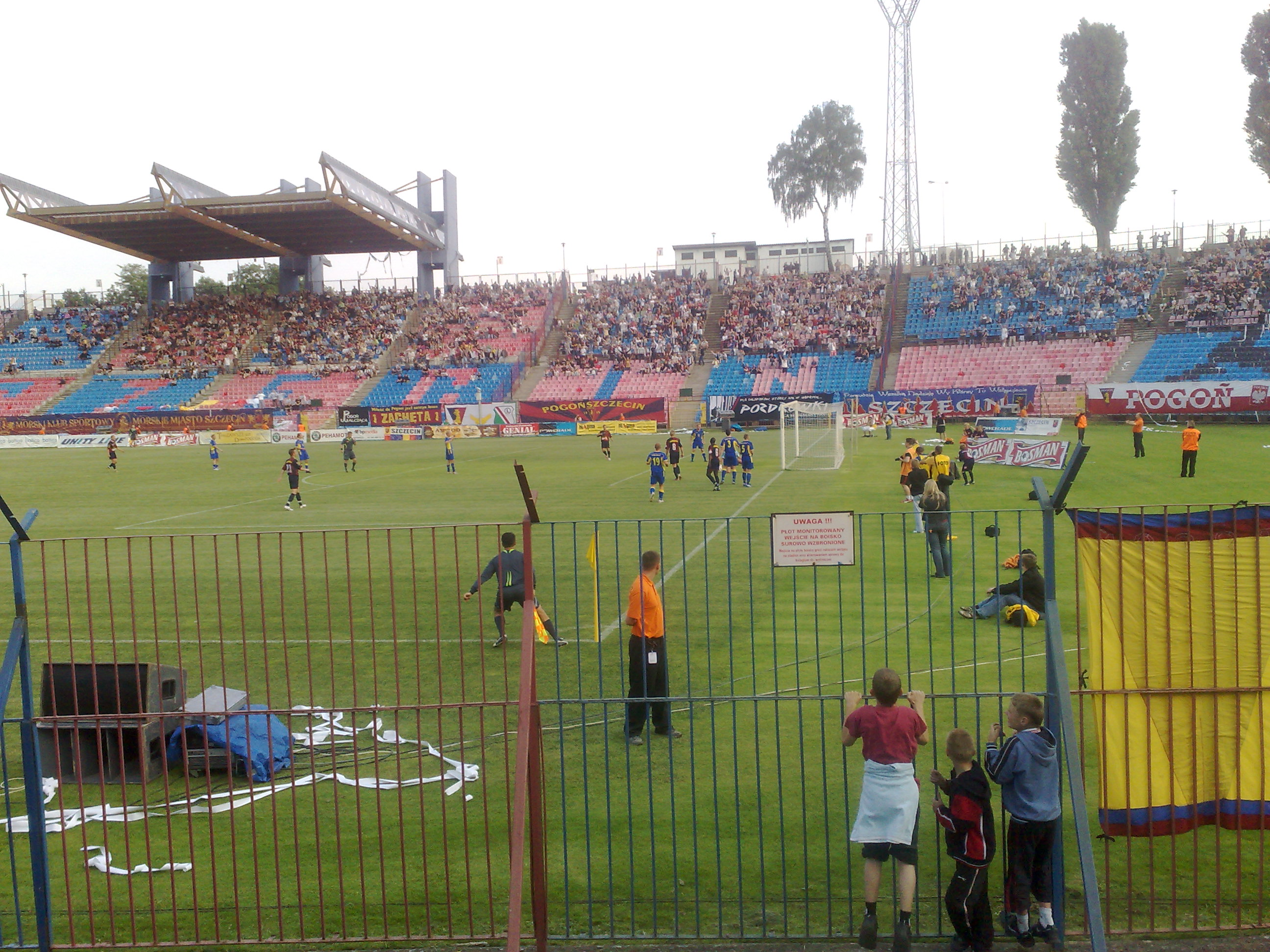 Mecz Pogoń Szczecin -Zatoka Puck